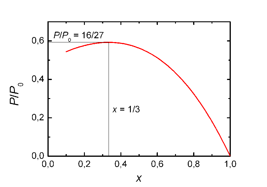 Betzsche Leistungskurve